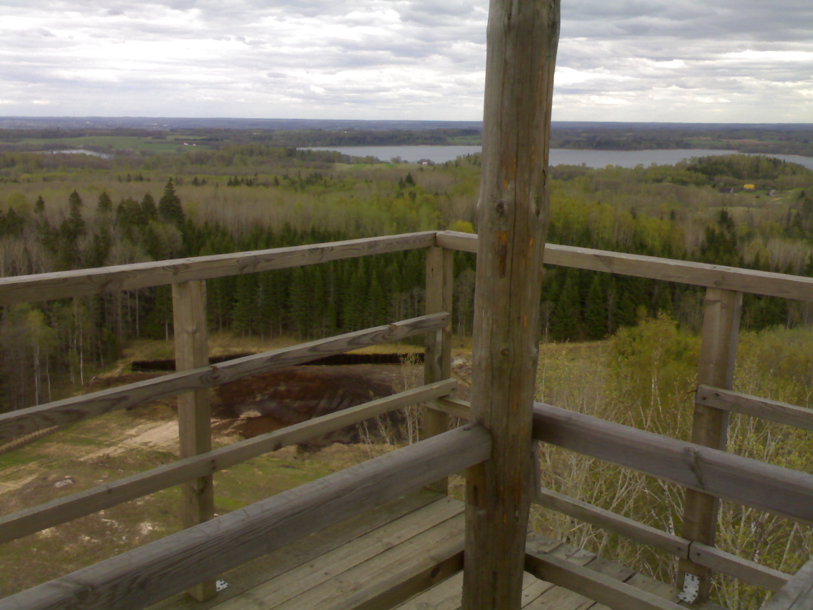 Viersā Egļukolna vierīņtūrnī